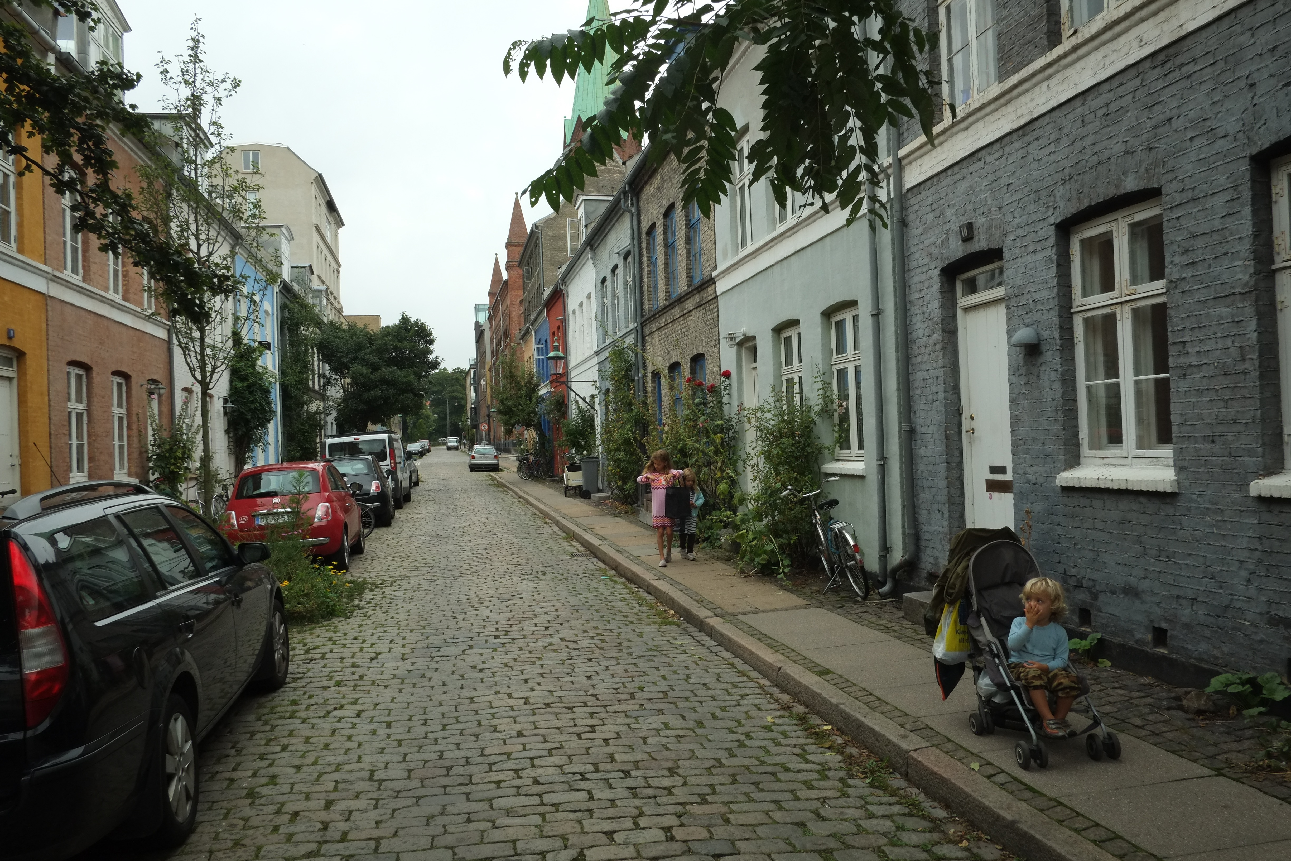 Krussemyntegade in Copenhagen, Denmark